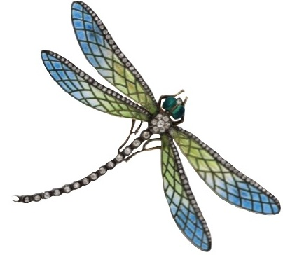 clip parisien 1900 de la société Peyret & fils, successeurs de Debacq